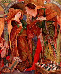 La beale Isoude and Sir Tristram